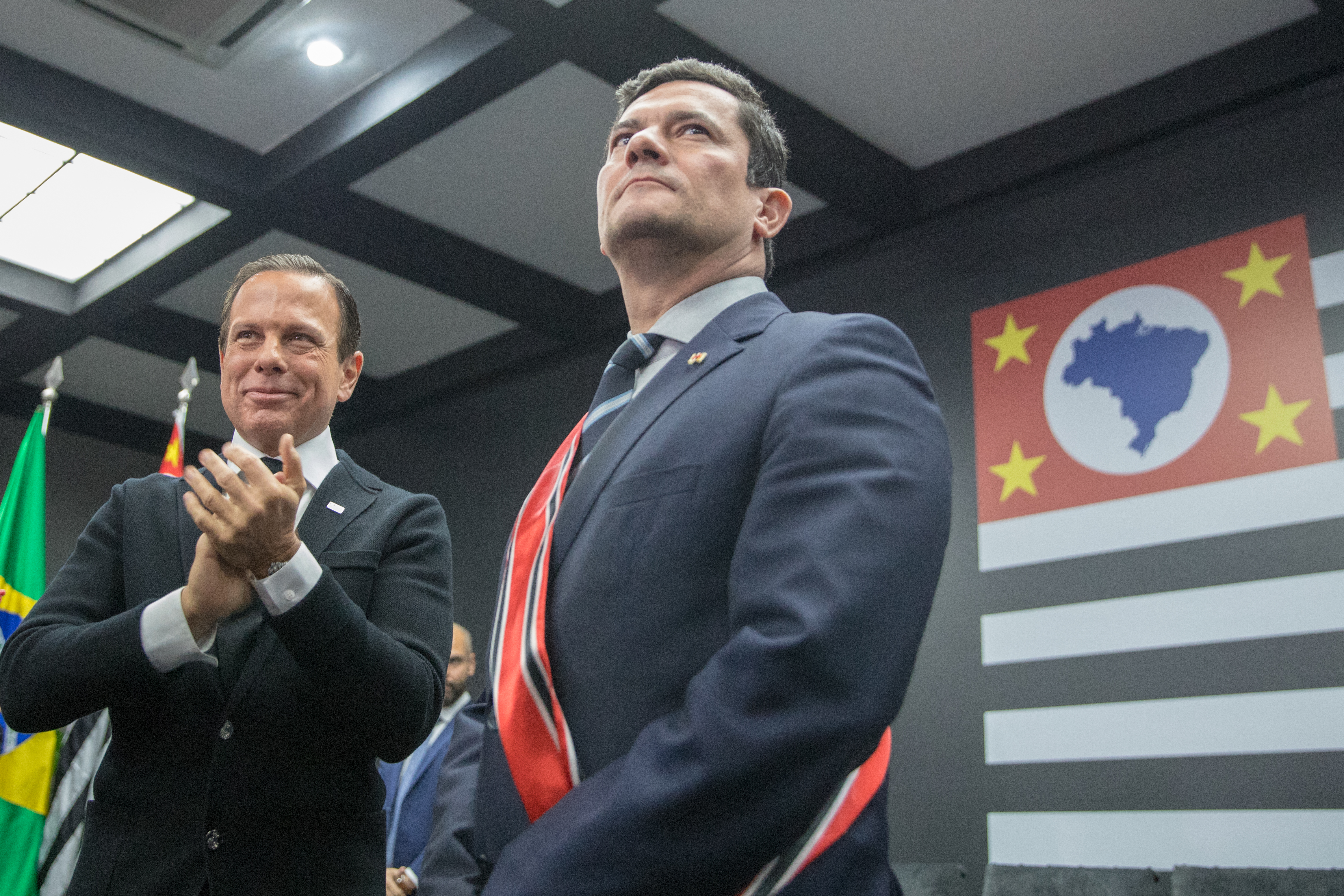 O governador do Estado de São Paulo, João Doria, participa de entrega de Medalha da Ordem do Ipiranga ao Ministro Sérgio Moro. Local: São Paulo/SP. Data: 28/06/2019. Foto: Governo do Estado de São Paulo